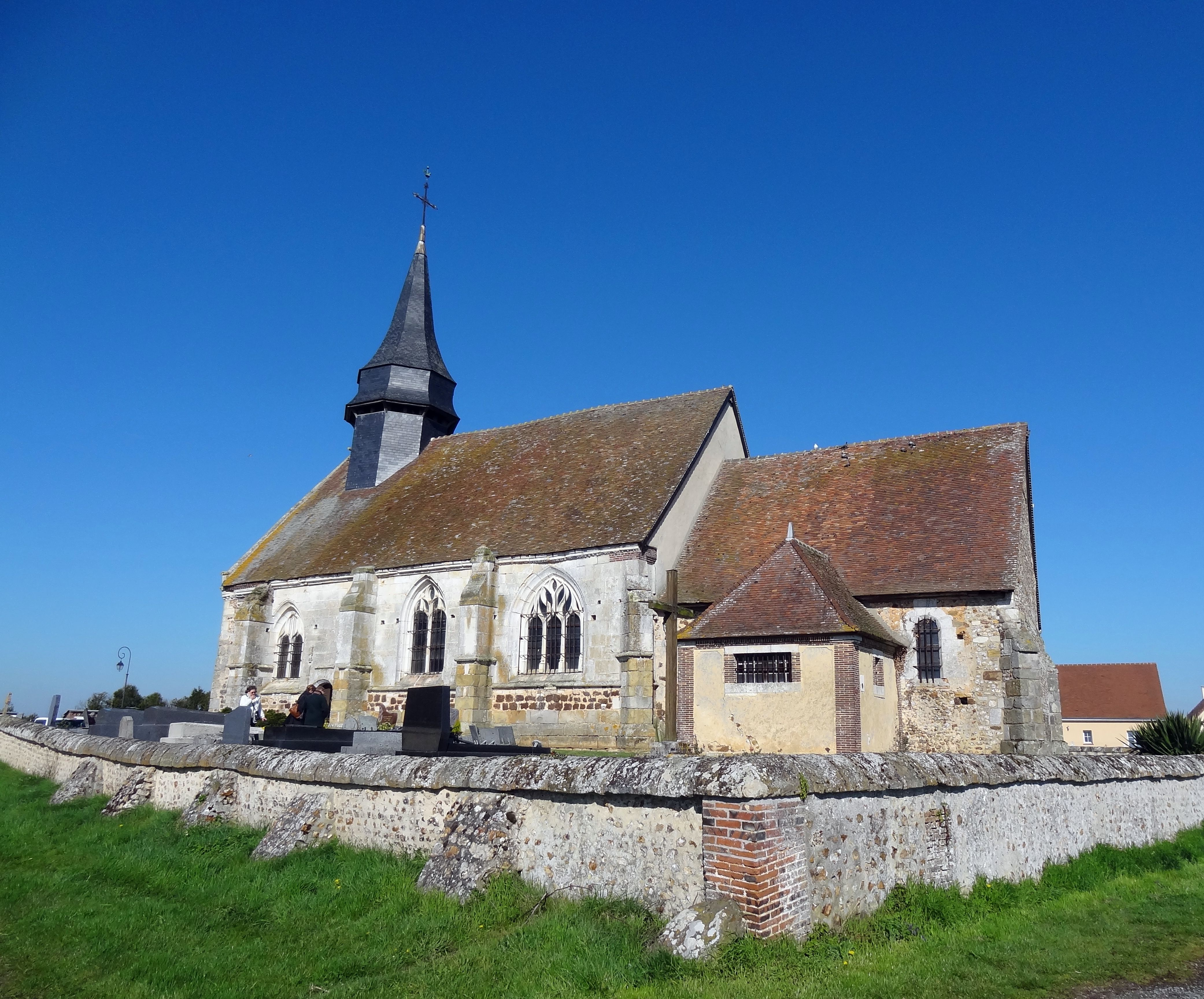 Église Notre-Dame à Dame-Marie (Eure), XIIe siècle.